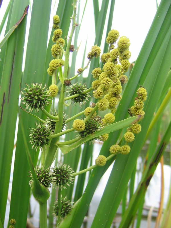 Ästiger Igelkolben Sparganium erectum, Müritz-Gebiet